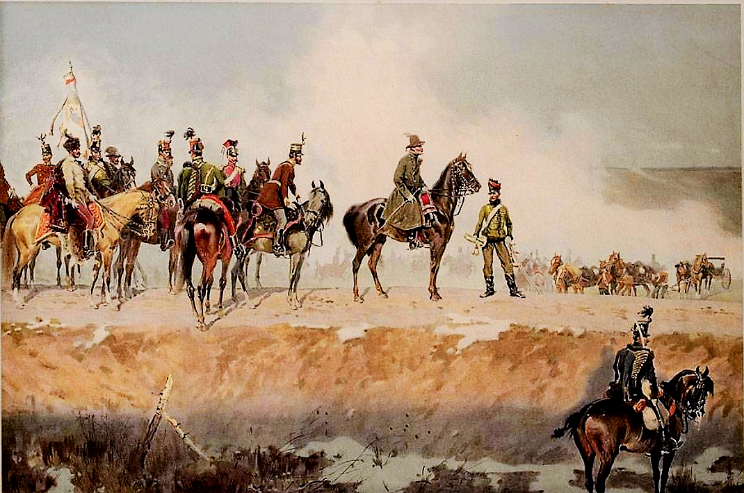 Erdélyi Panoráma Bem a nagyszebeni ütközetben, 1849. március 11.